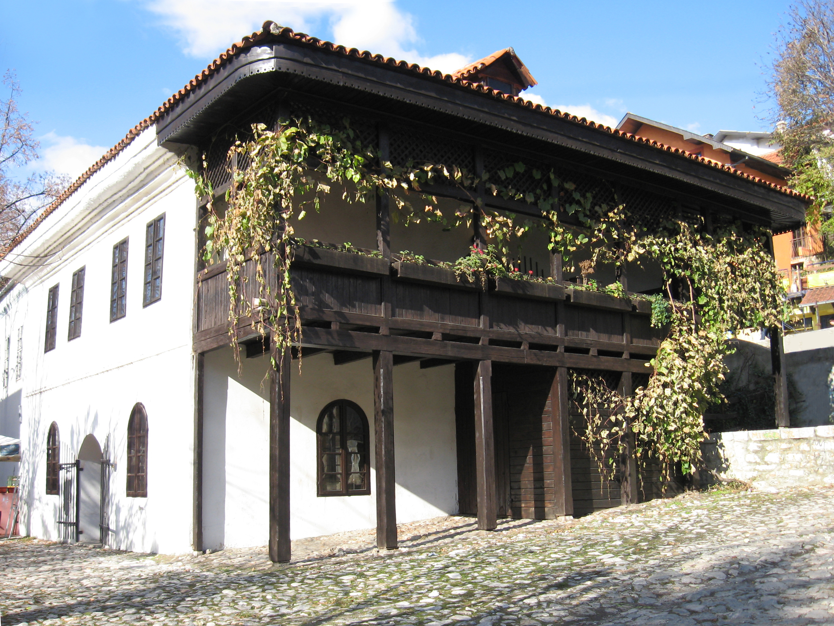 JOKANOVICA KUCA